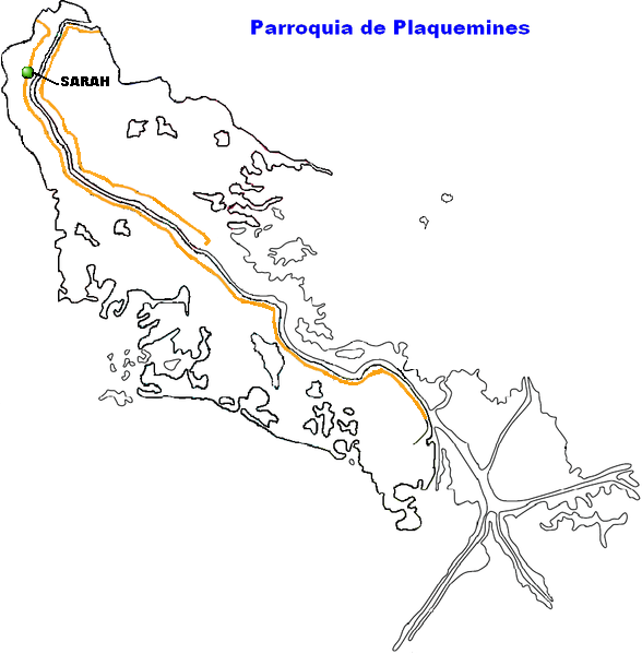 Sarah, Louisiana.